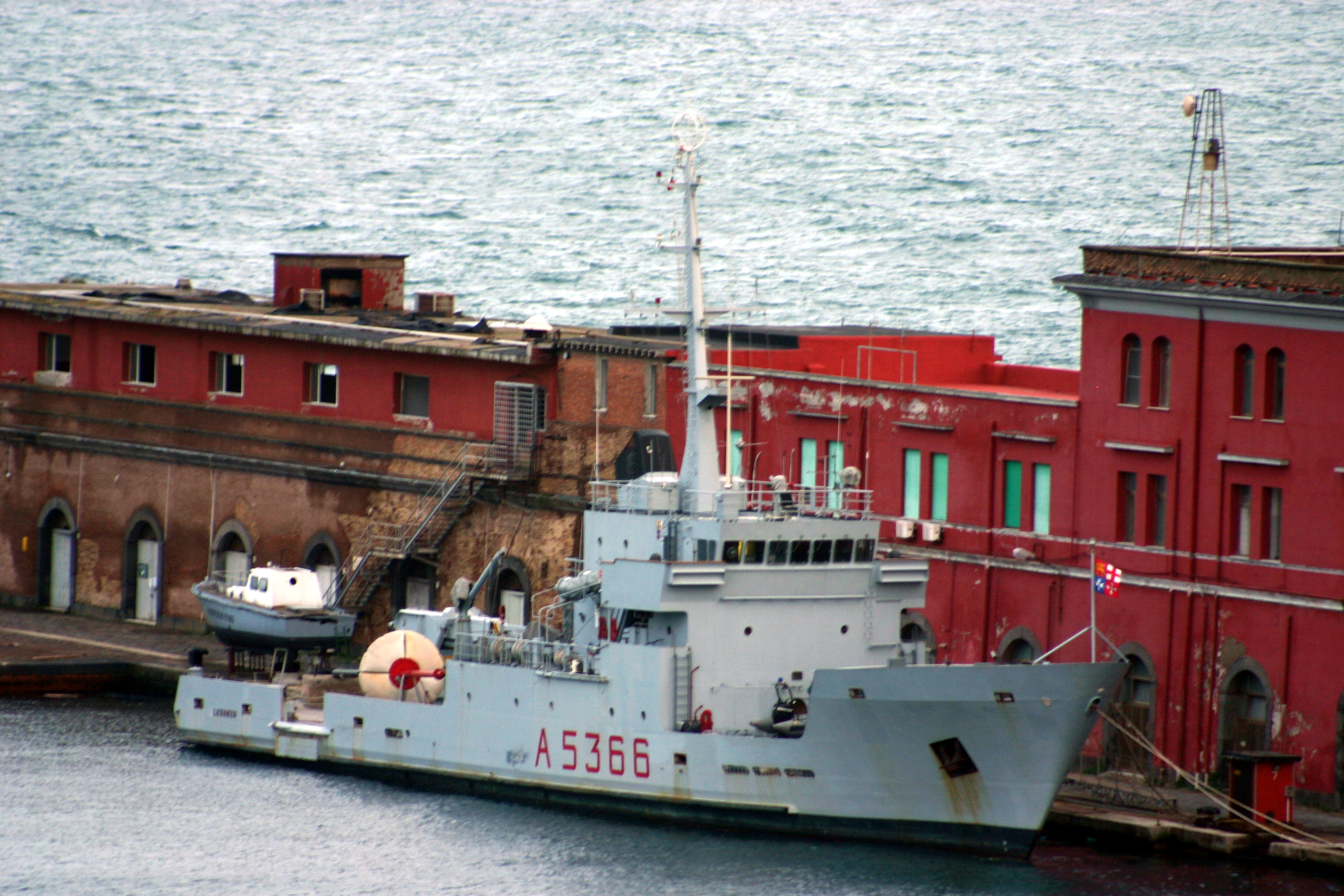 Vistas a partir do Castel Nuovo - Nápoles